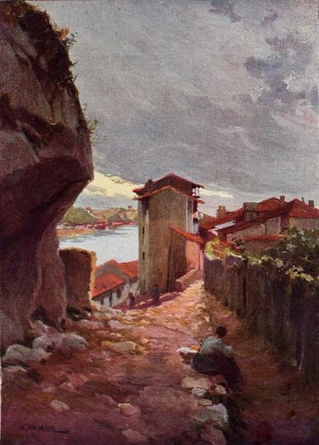 Acuarela de un paisaje de San Vicente de la Barquera (Cantabria, España), pintada en 1904 por Ángel Andrade Blázquez (1866-1932): pintor y escultor manchego que también ejerció la docencia. Sus mejores trabajos como plenairista los hizo en Italia, durante su estancia en Roma, pintando paisajes de los alrededores de la ciudad y de los Apeninos.